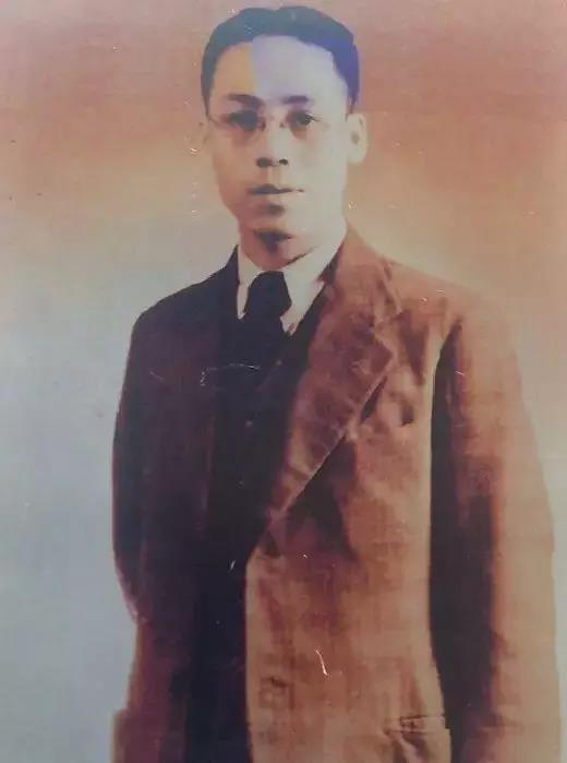 马文蔚，“中国人民银行”标准字体的题写者